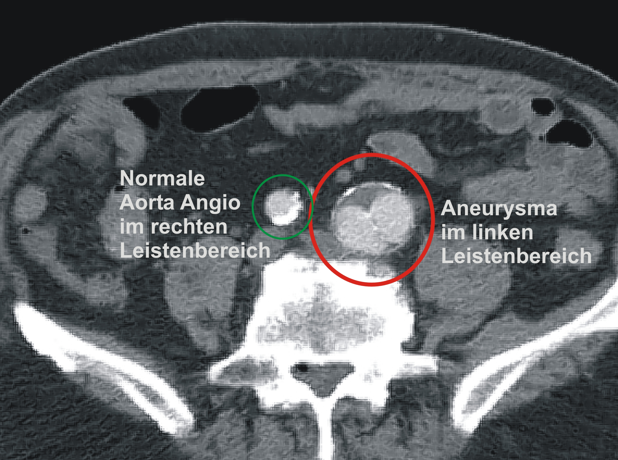 Kontrastmittelverstärktes CT, axialer Schnitt auf Höhe der Gabelung der linken Leistenarterie (art. iliaca communis links) von presse03. Erstellt am 25. Mai 2011